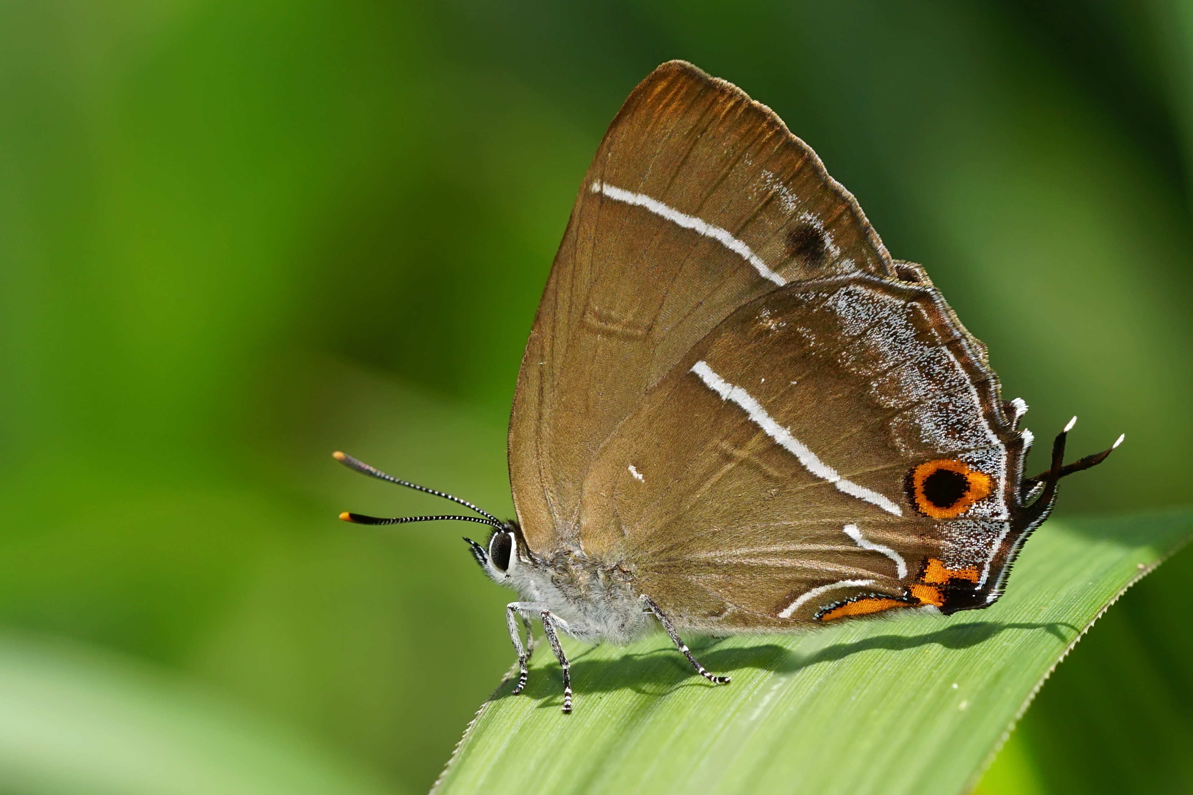 台灣榿翠灰蝶（Neozephyrus taiwanus）